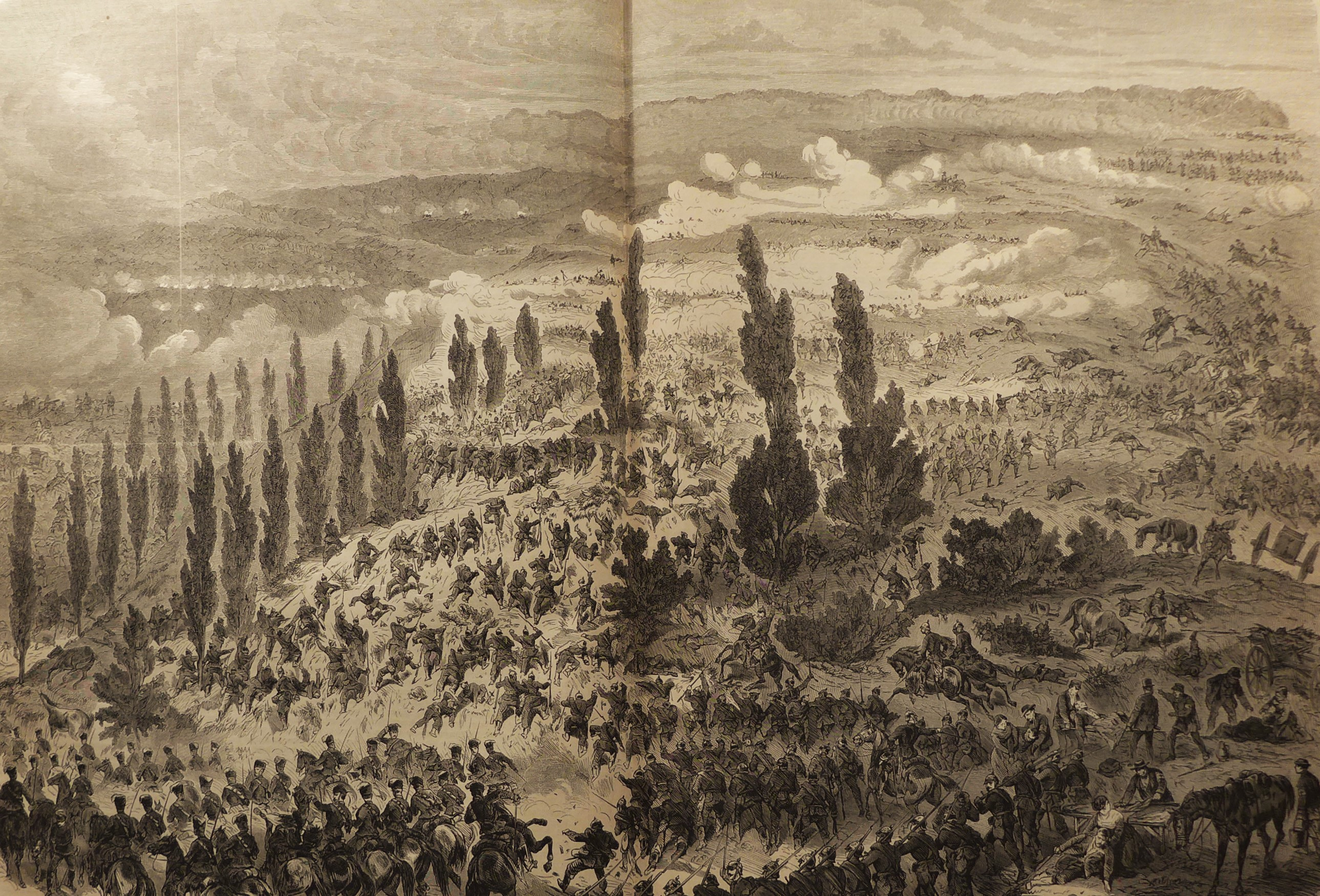 Erstürmung der Spicherer Höhen bei Saarbrücken am 6. August 1870 (Illustrierte Kriegschronik, Gedenkbuch an den Deutsch-Französischen Feldzug von 1870-1871, Leipzig 1871, S. 88-89)